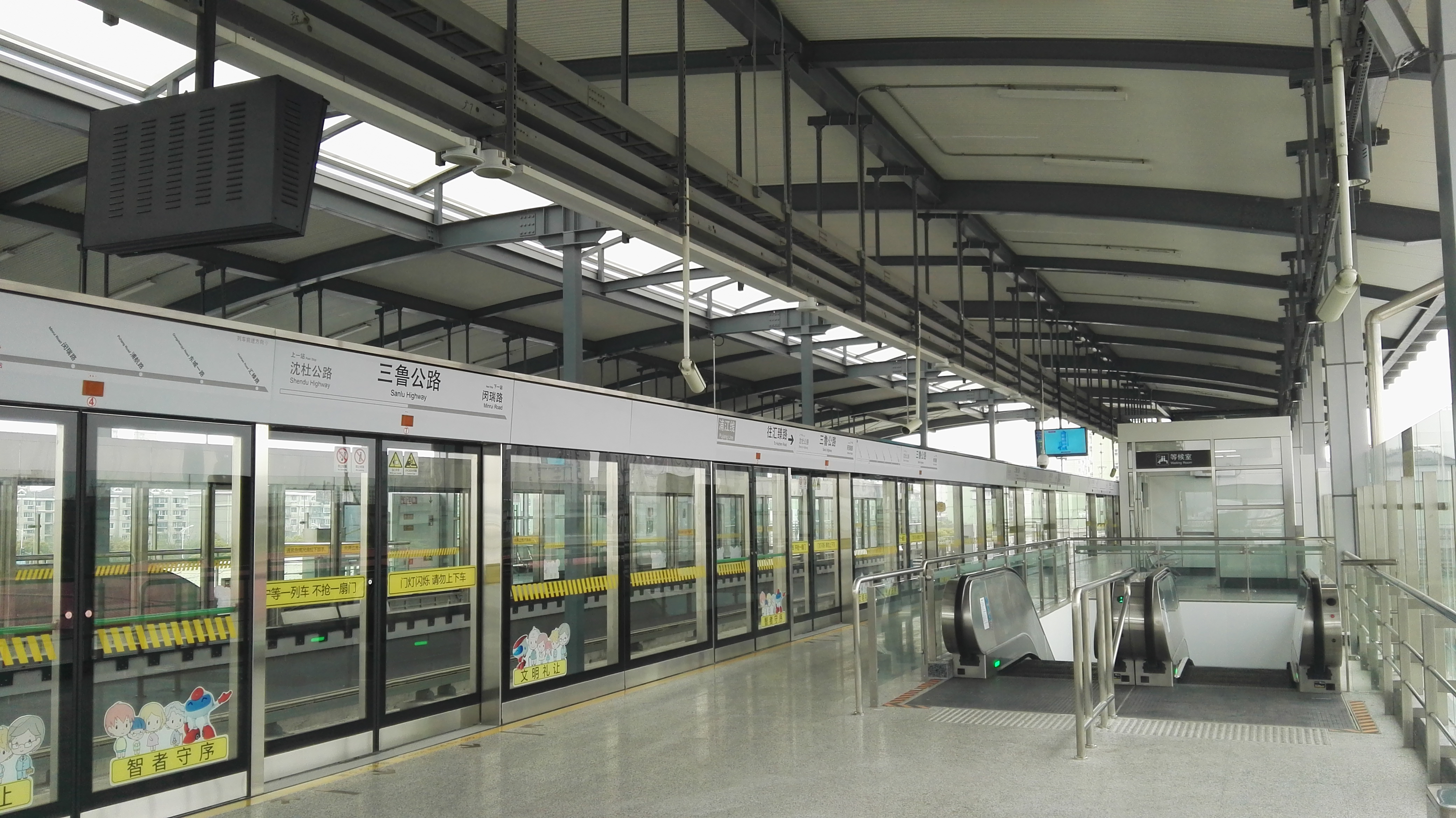 三鲁公路站汇臻路方向站台。